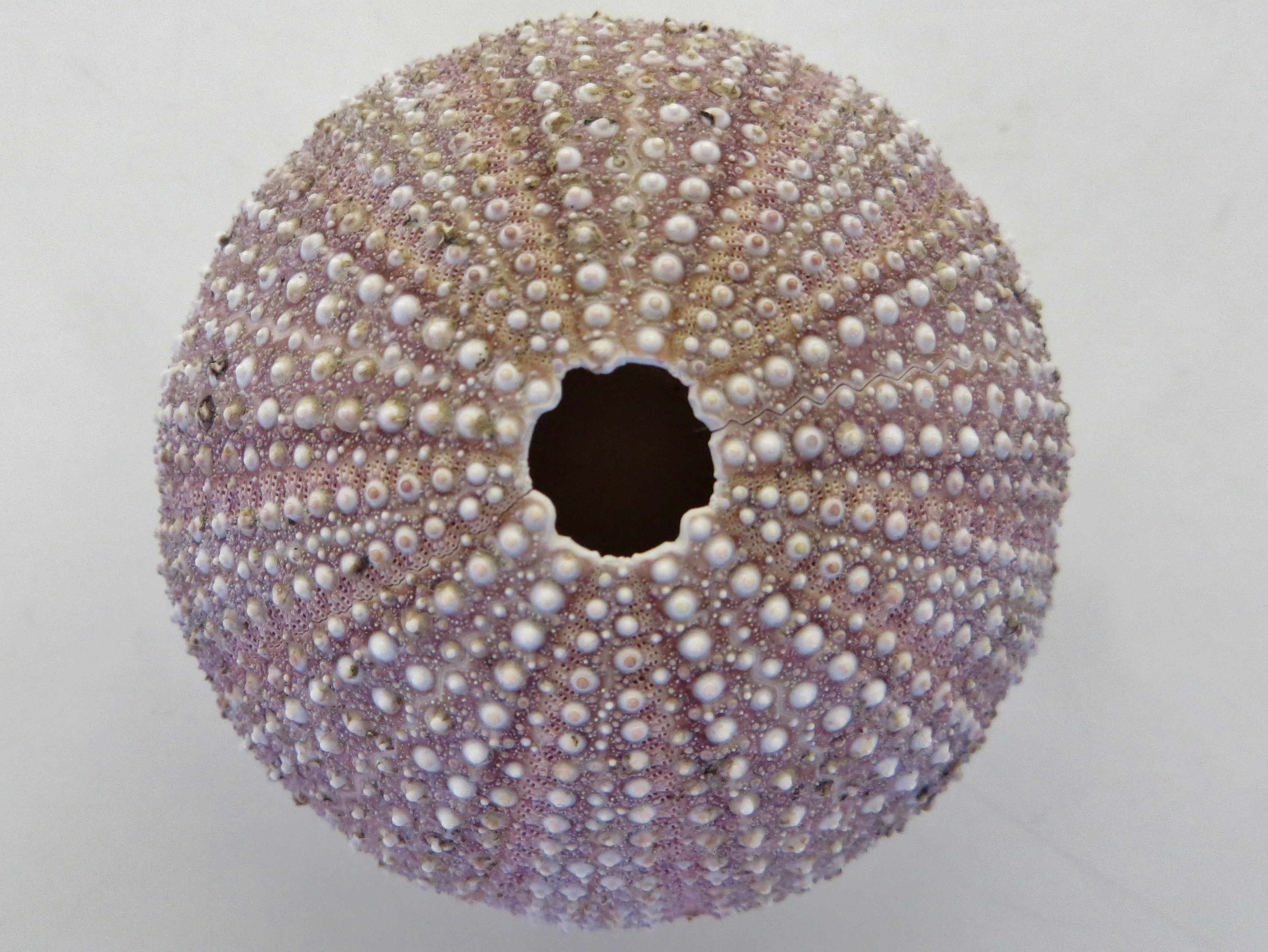 Test d'un oursin Sphaerechinus granularis. Provenance : Observatoire océanographique de Banyuls-sur-mer.